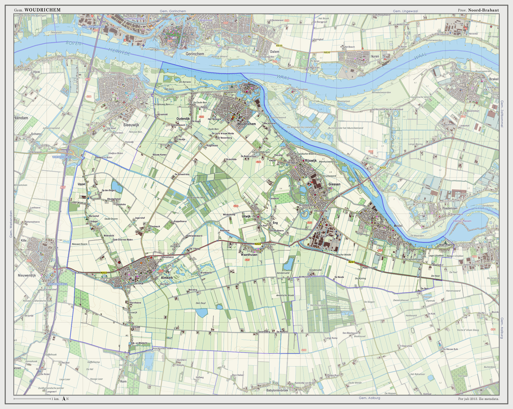 Topografische kaart van gemeente Woudrichem (2013). Samengesteld door Jan-Willem van Aalst op basis van de GML open geodata van de BRT/Top10NL (basisregistratie Topografie, Kadaster 2011), vrijgegeven door Kadaster onder de Creative Commons BY licentie. Additionele gegevens uit BAG (8 juli 2013), uit de Open Street Map (9 juli 2013) en uit de Risicokaart. Peildatum kaartbeeld: 9 juli 2013. Zie ook Gemeentenatlas.nl Samenstelling en kleurenschema: Jan-Willem van Aalst, met QuantumGIS en Photoshop. Zie ook de Legenda.